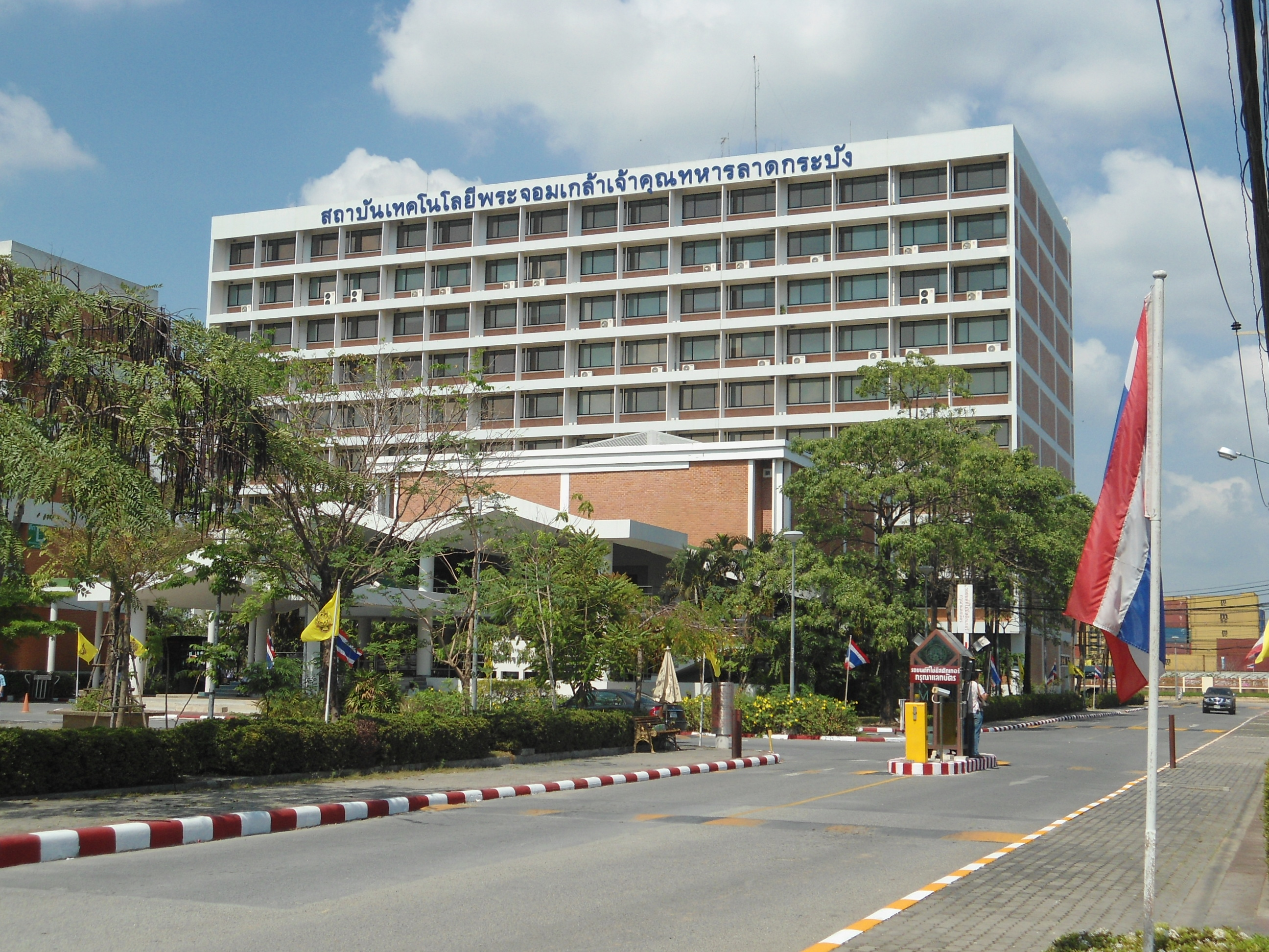 สถาบันเทคโนโลยีพระจอมเกล้าเจ้าคุณทหารลาดกระบัง ตึกอธิการบดี